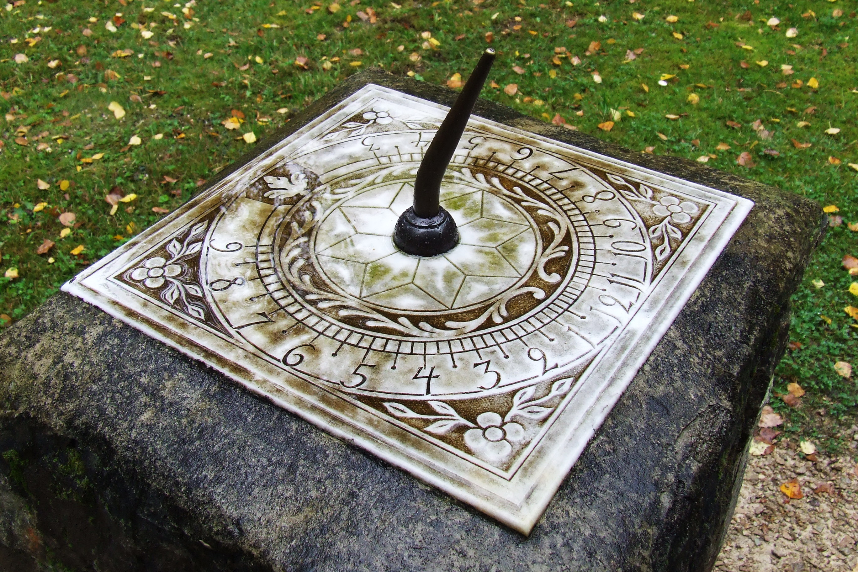 1926. gadā no kādas muižas Rēzeknes apriņķī uz Latvijas Etnogrāfisko brīvdabas muzeju pārvests saules pulkstenis.